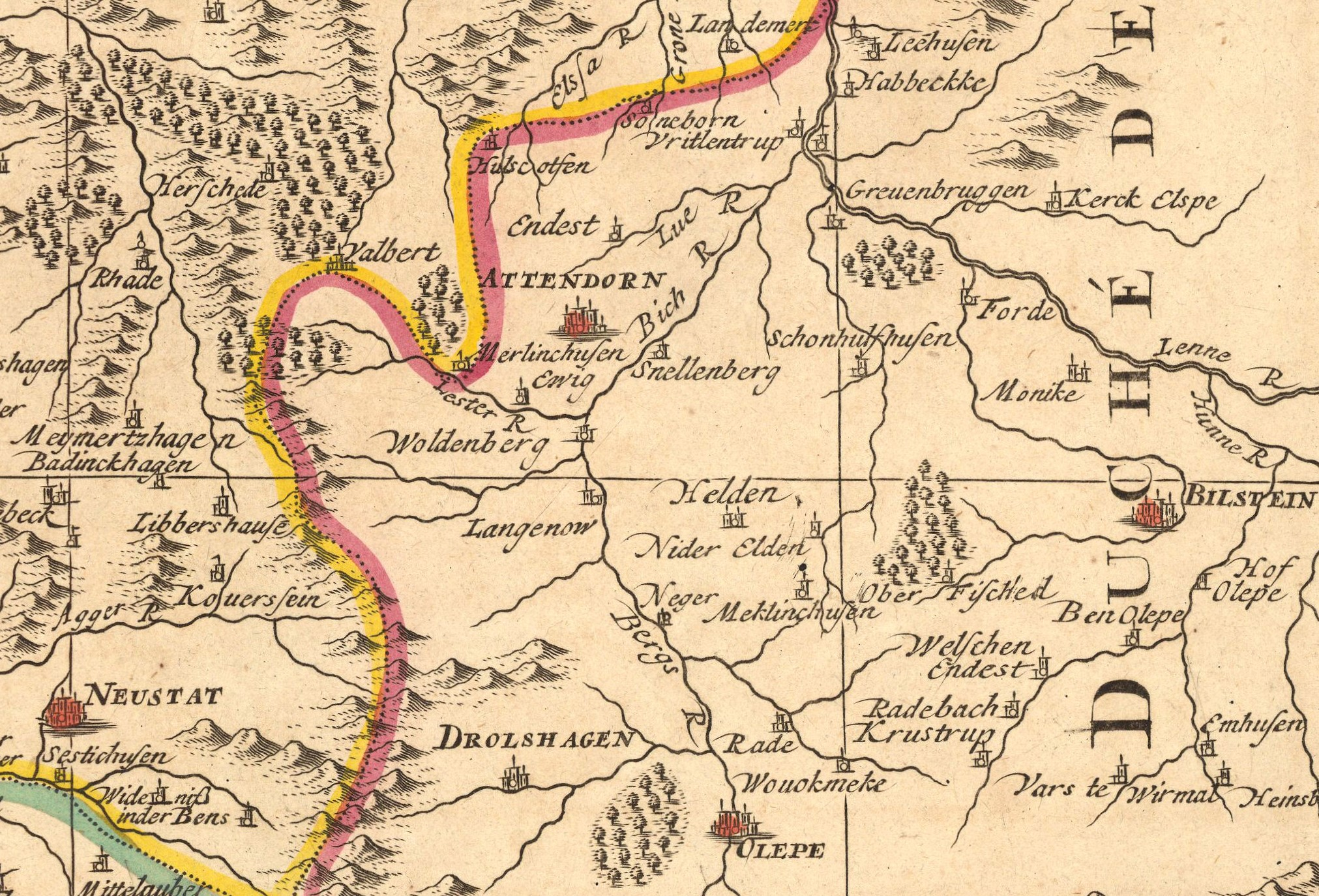 Kolorierter Kupferstich „Le Comté De La Marck“ von Guillaume Sanson, hergestellt 1692 von A. H. Jaillot in Paris. – Kartenausschnitt der Grafschaft Mark (links) und des Herzogtums Westfalen (rechts). Eingezeichnet u.a. Attendorn, Ennest, Schnellenberg, Merklinghausen, Ewig, Waldenburg, Langenohl, Helden und die Bigge.